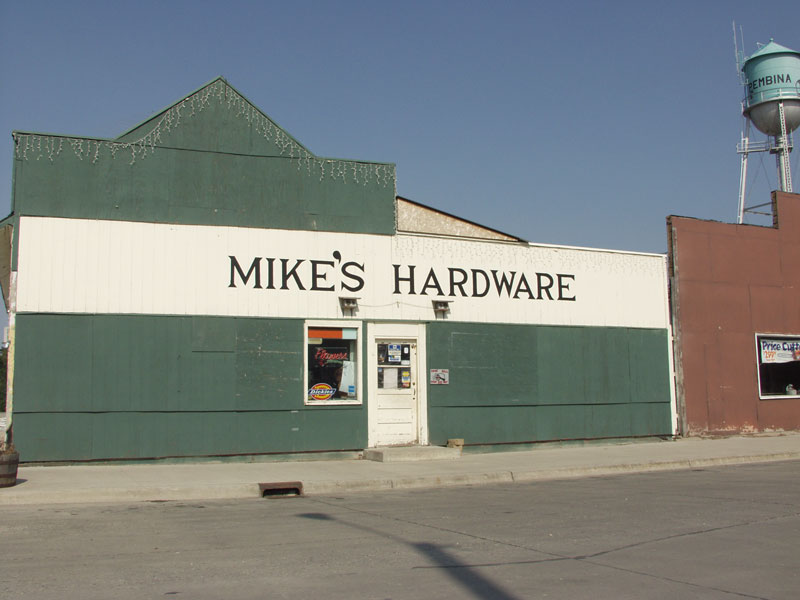 Pembina, North Dakota. From .